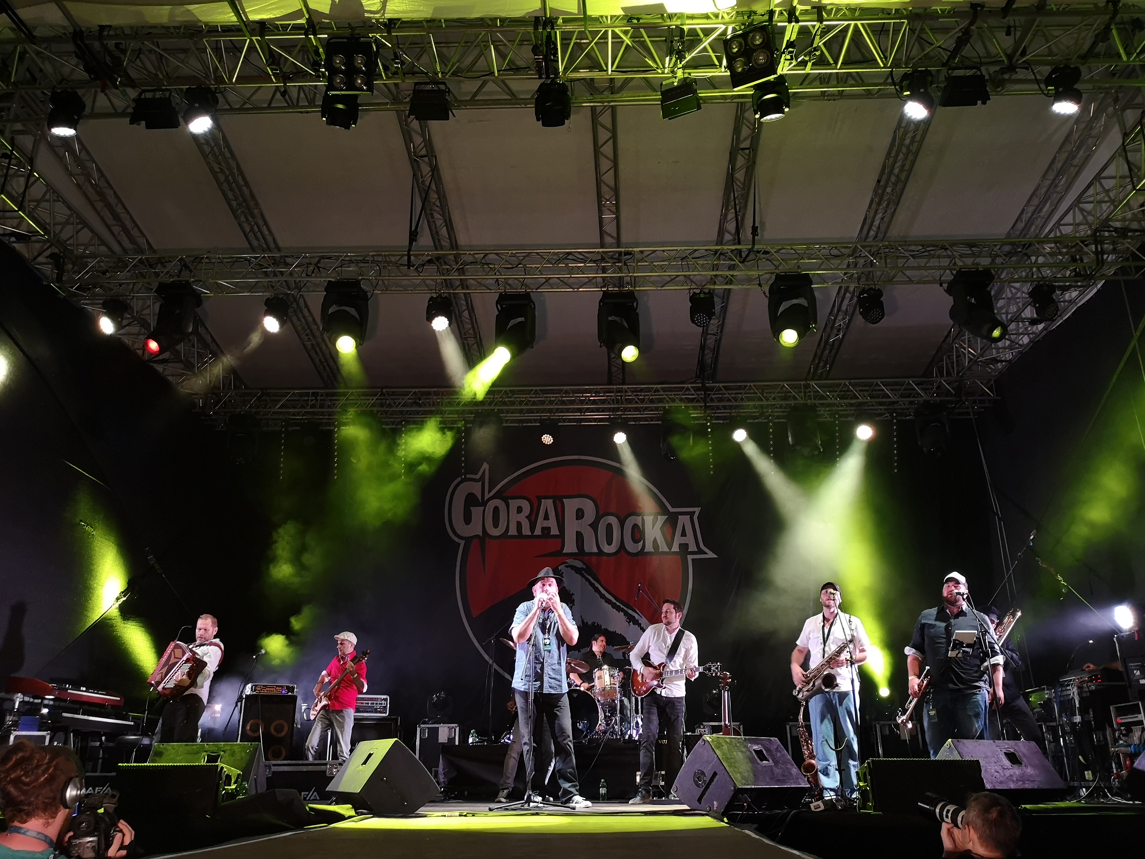 Na sliki je nastop skupine Orlek na festivalu Gora Rocka iz leta 2019.